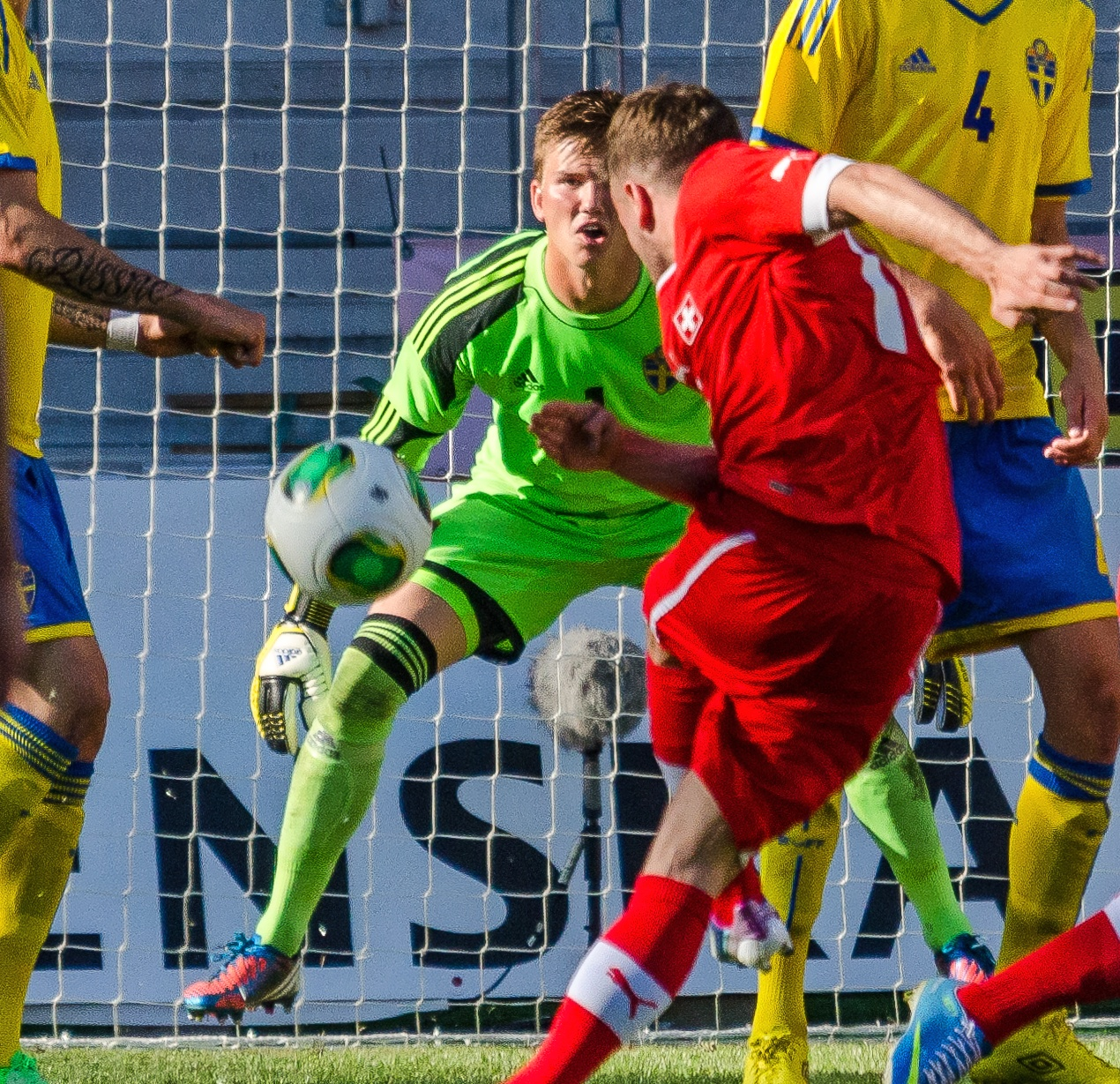 Målvakten August Strömberg i det svenska U21-landslagets 3-2 seger mot Schweiz i en träninglandskamp på Myresjöhus Arena i Växjö, 6/6 2013.